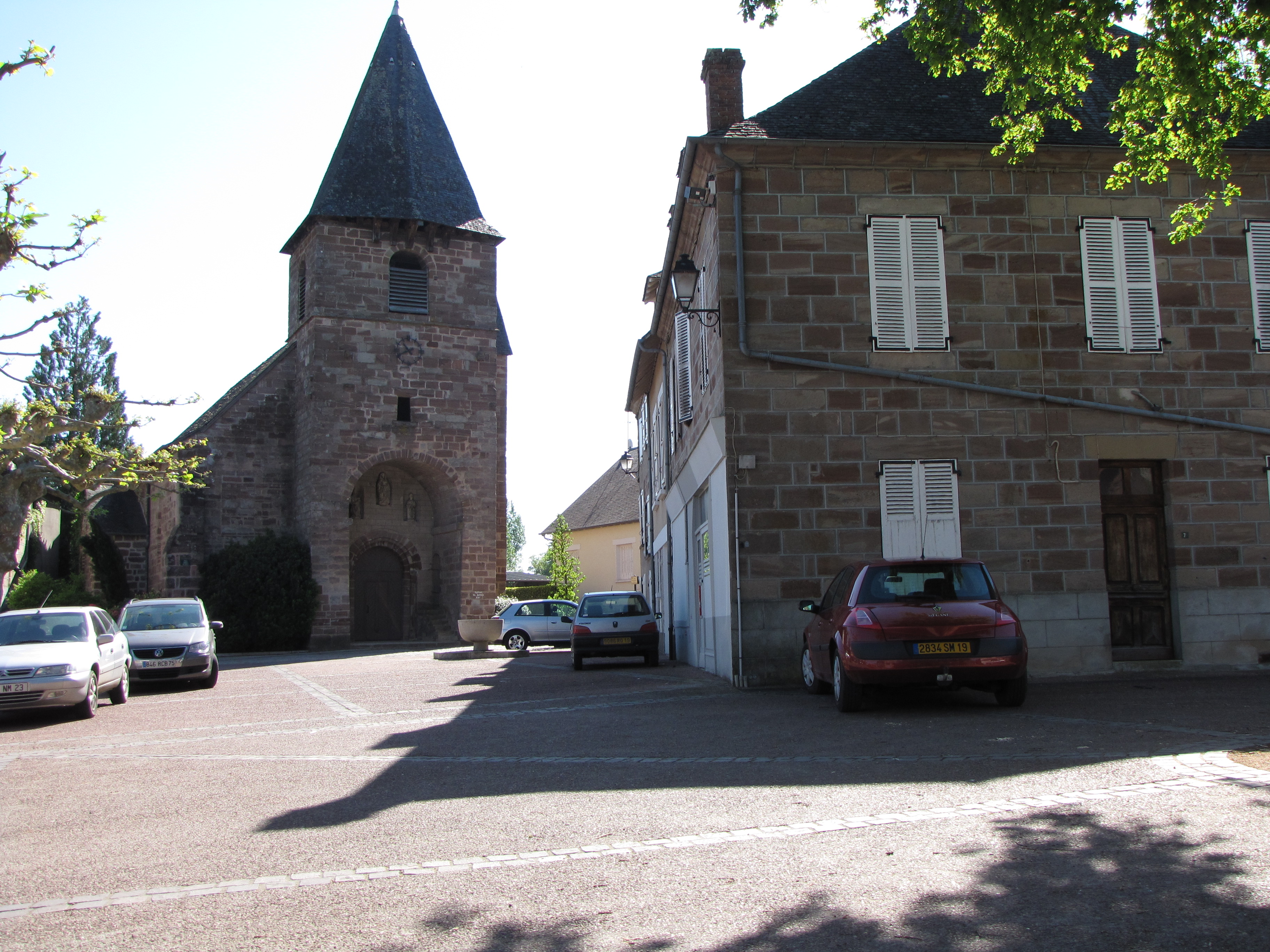 Église de Varetz